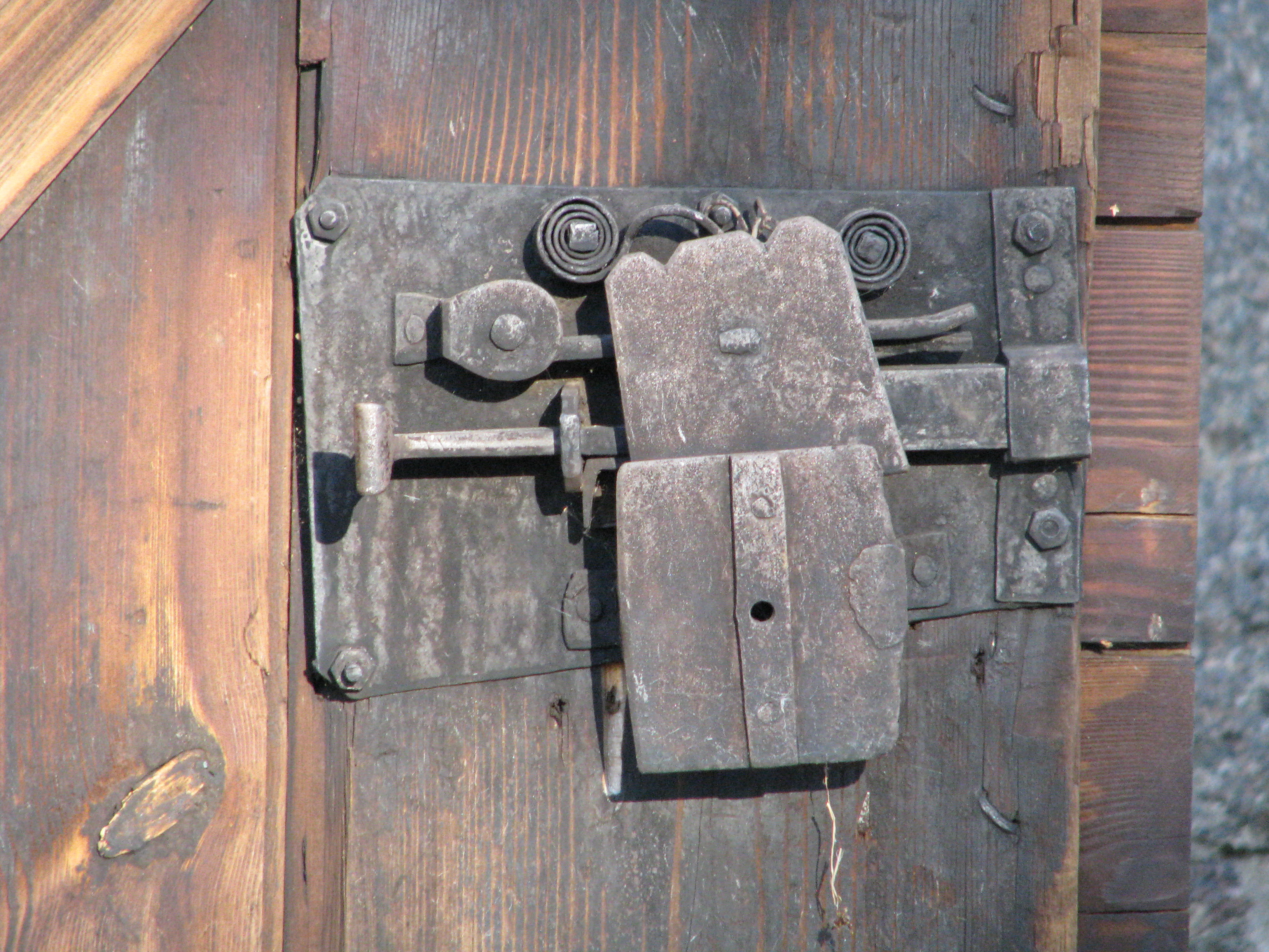 Stenmagasinet i Ädelfors (Repperda 3:22) Dörrlås på ingången till stenmagasinet i Ädelfors